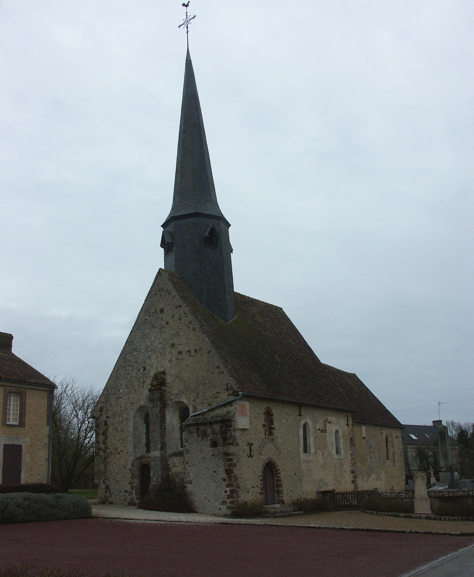 Construite au 12e siècle en grison. ISMH 2006.ext, vu du sud ouest